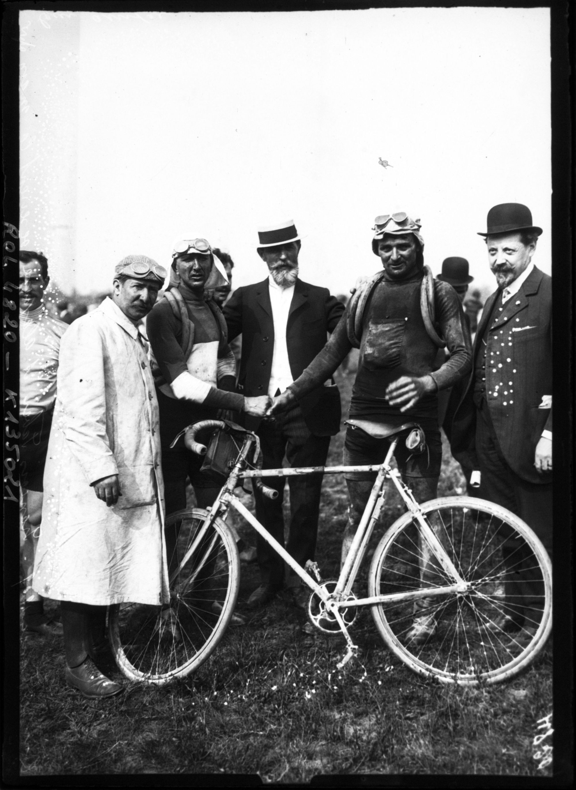 François Faber et Jean Alavoine à l'arrivée du Tour de France 1909